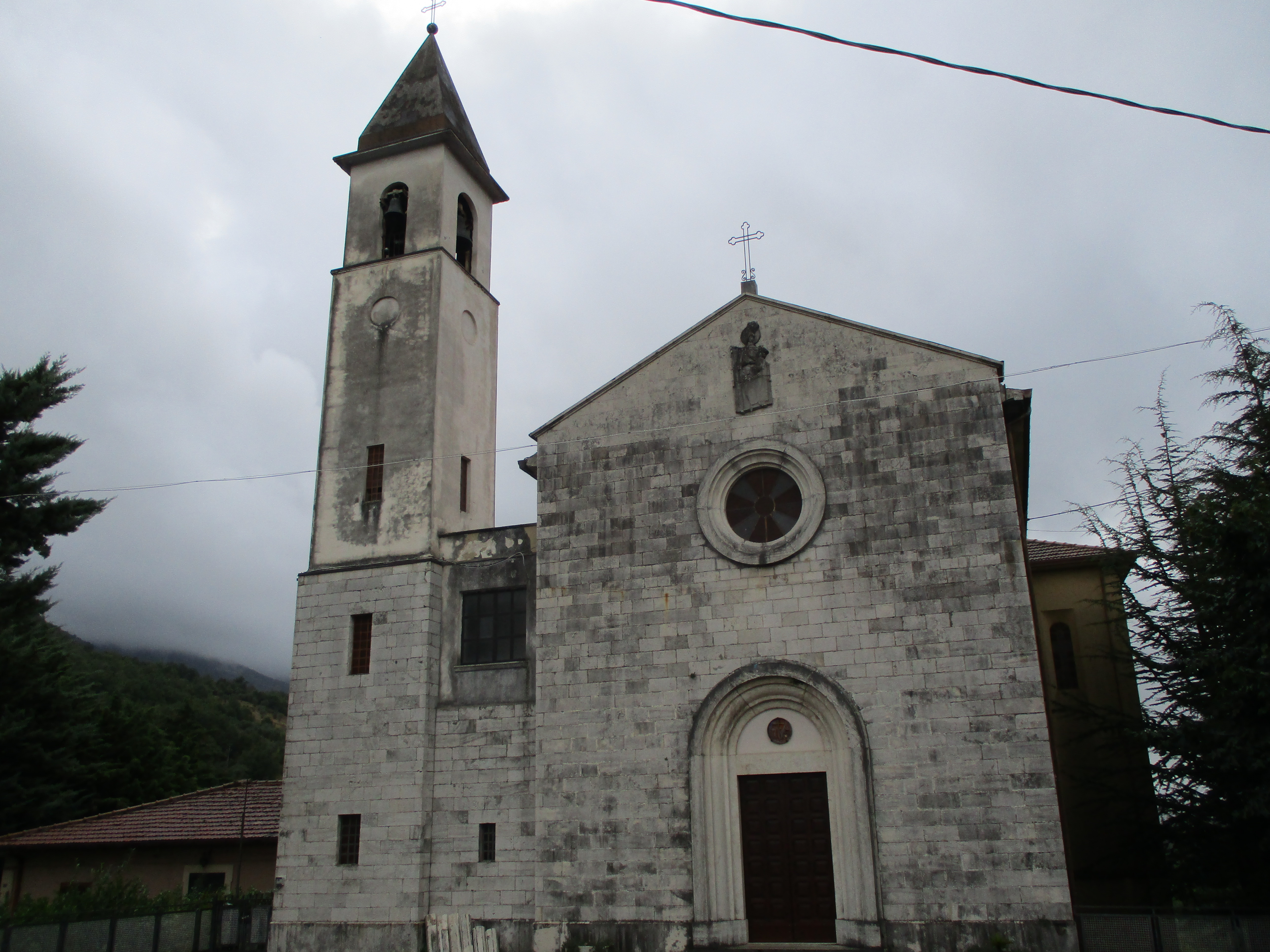 Facciata della chiesa e campanile di Santa Restituta